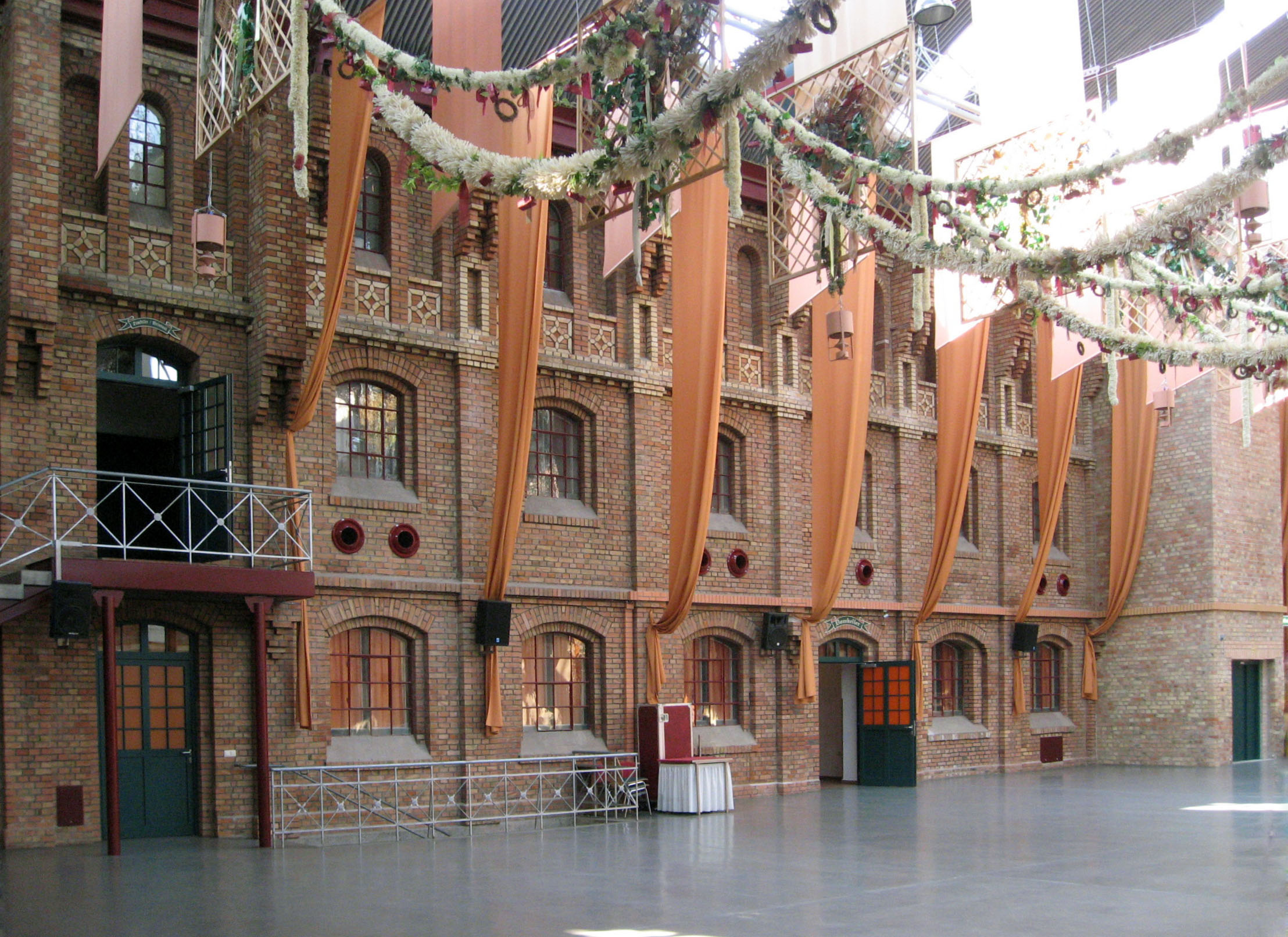 Rotkäppchen Sektkellerei Freyburg (Unstrut), Lichthof